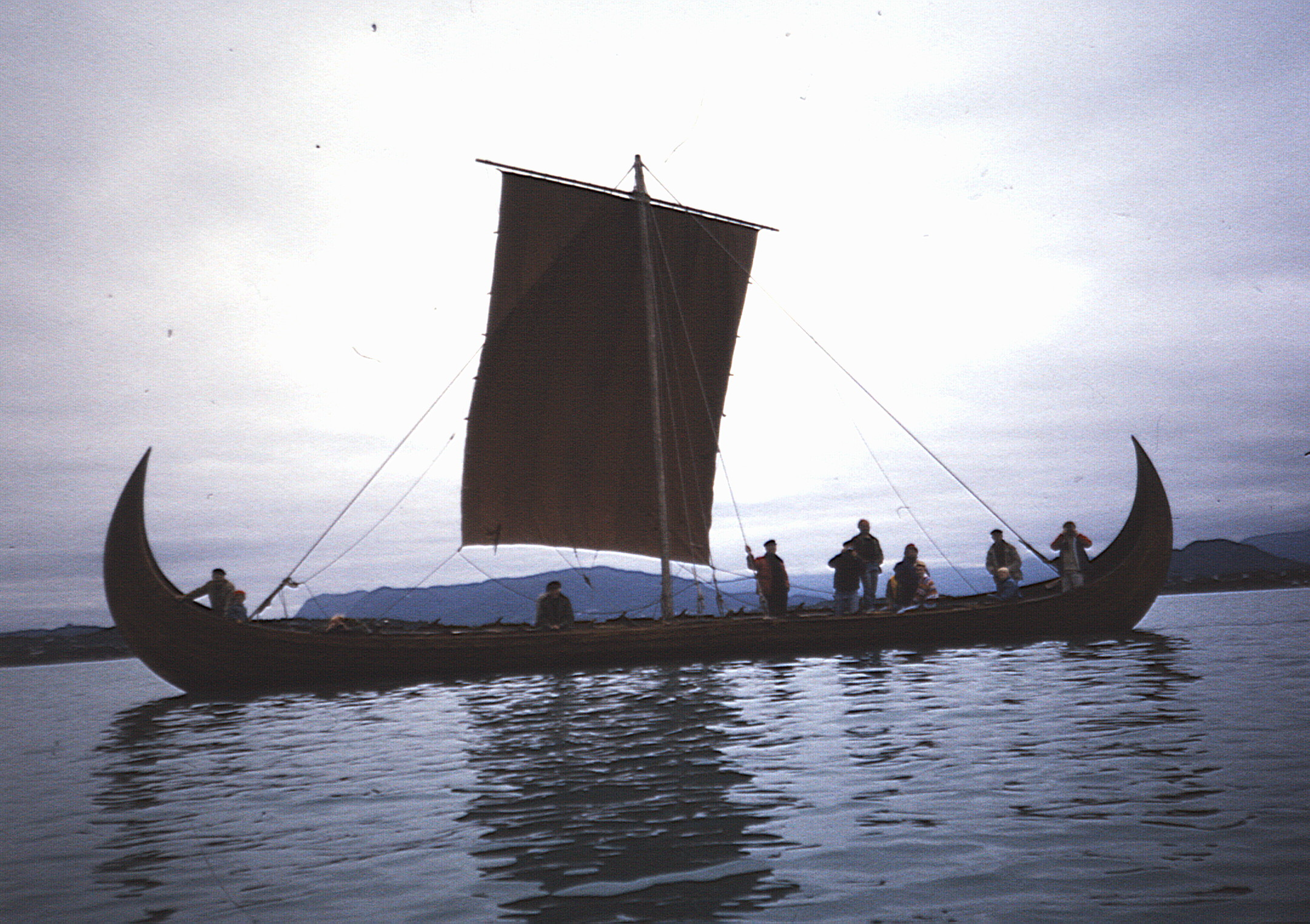 Forsøk med segl på Kvalsundskipet